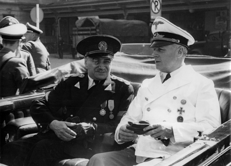 Rumäniens Staatsmänner in Salzburg. Unser Bild von der Ankunft der rumänsichen Staatsmänner am Freitagvormittag in Salzburg zeigt den Reichsminister des Auswärtigen, von Ribbentrop, mit dem Königlich Rumänischen Ministerpräsidenten Gigurtu in ihrem Wagen bei der Abfarht vom Salzburger Bahnhof zum Hotel "Österreichischer Hof", wohin der Reichsaussenminister die Gäste nach der Begrüßung geleitet. 27.7.40 6237-40 Information added by Wikimedia users.